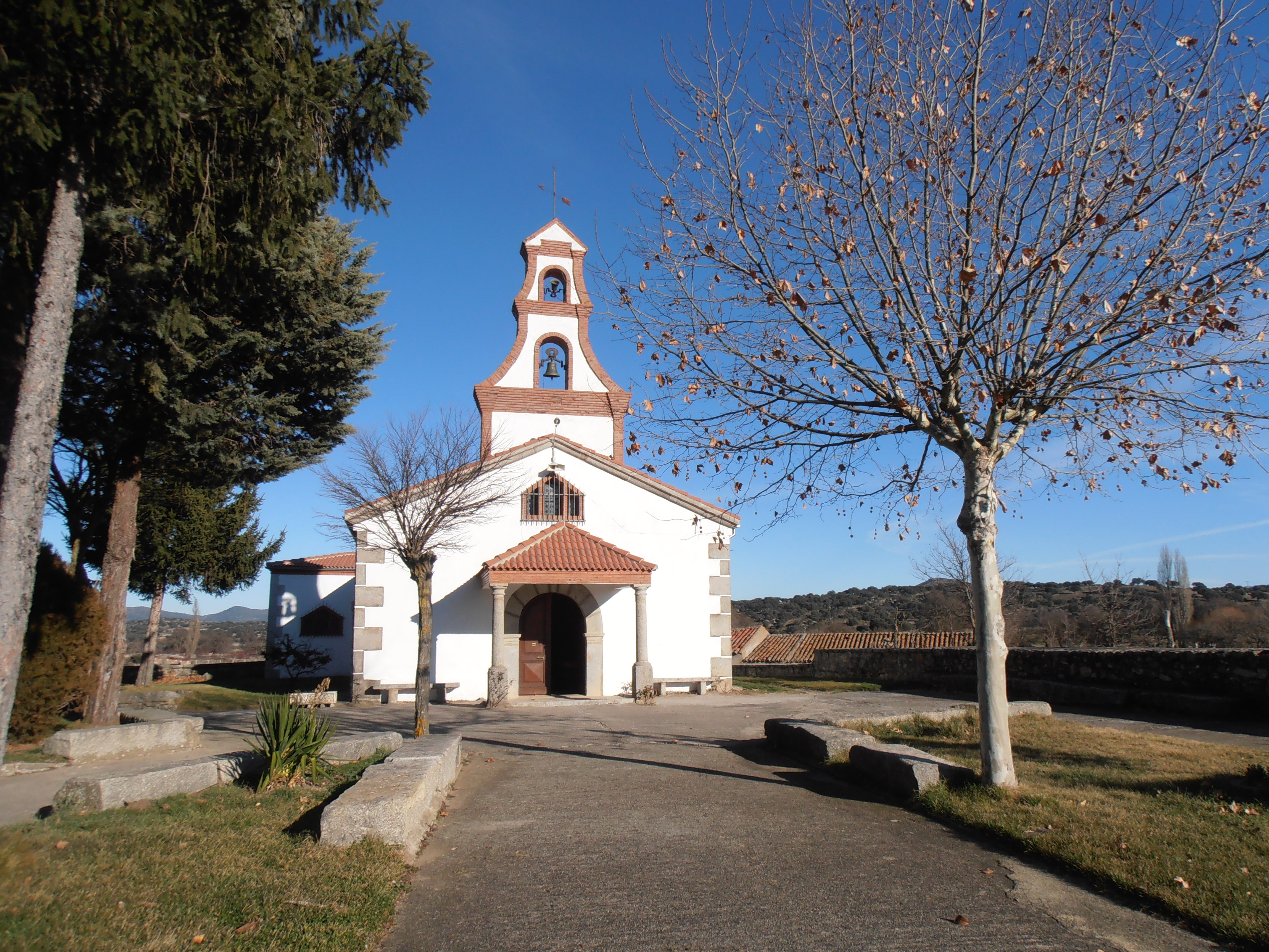 ermita nuestra señora virgen de valparaiso